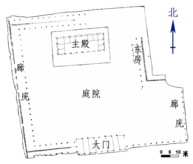 二里头一号宫殿平面图（简体）。